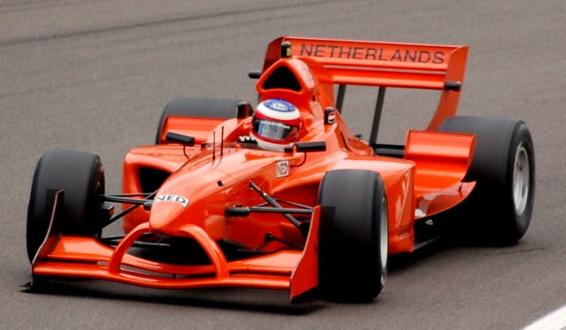 Jeroen Bleekemolen driving for A1 Grand Prix Team Netherlands at Zandvoort in 2006.